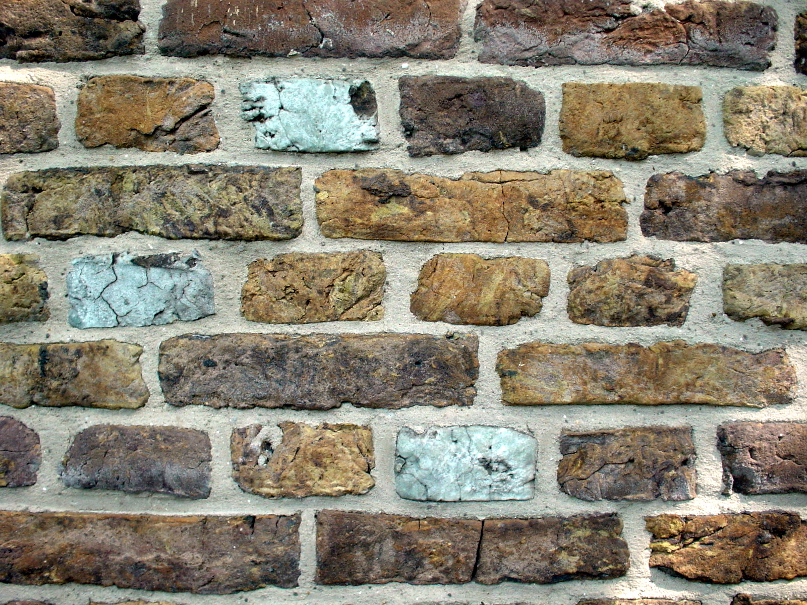 Hard gebakken stenen in de westgevel